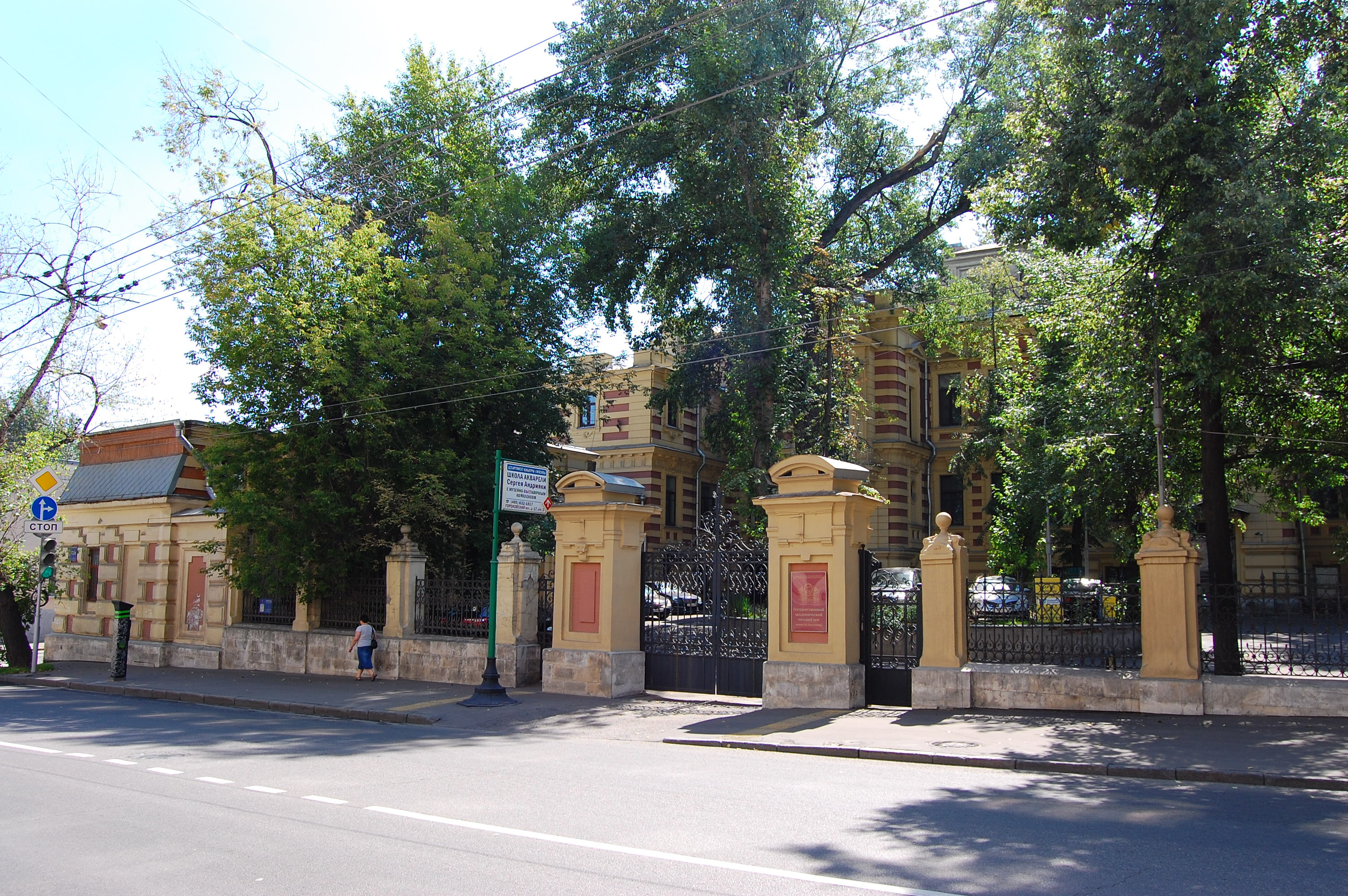 Усадьба Ф. И. Прове – А. И. Калиш, флигель и ограда